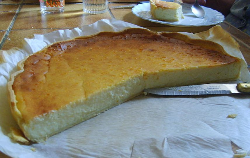 Una tarta flausona, tallada per a poder apreciar el seu interior